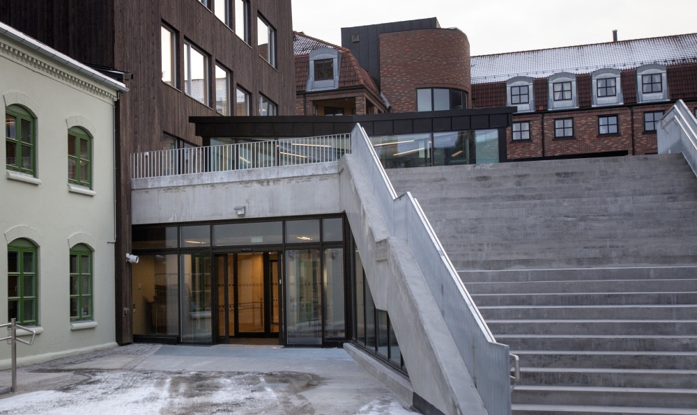 Bildet av NTNU Lysholmbiblioteket på campus Kalvskinnet i Trondheim.